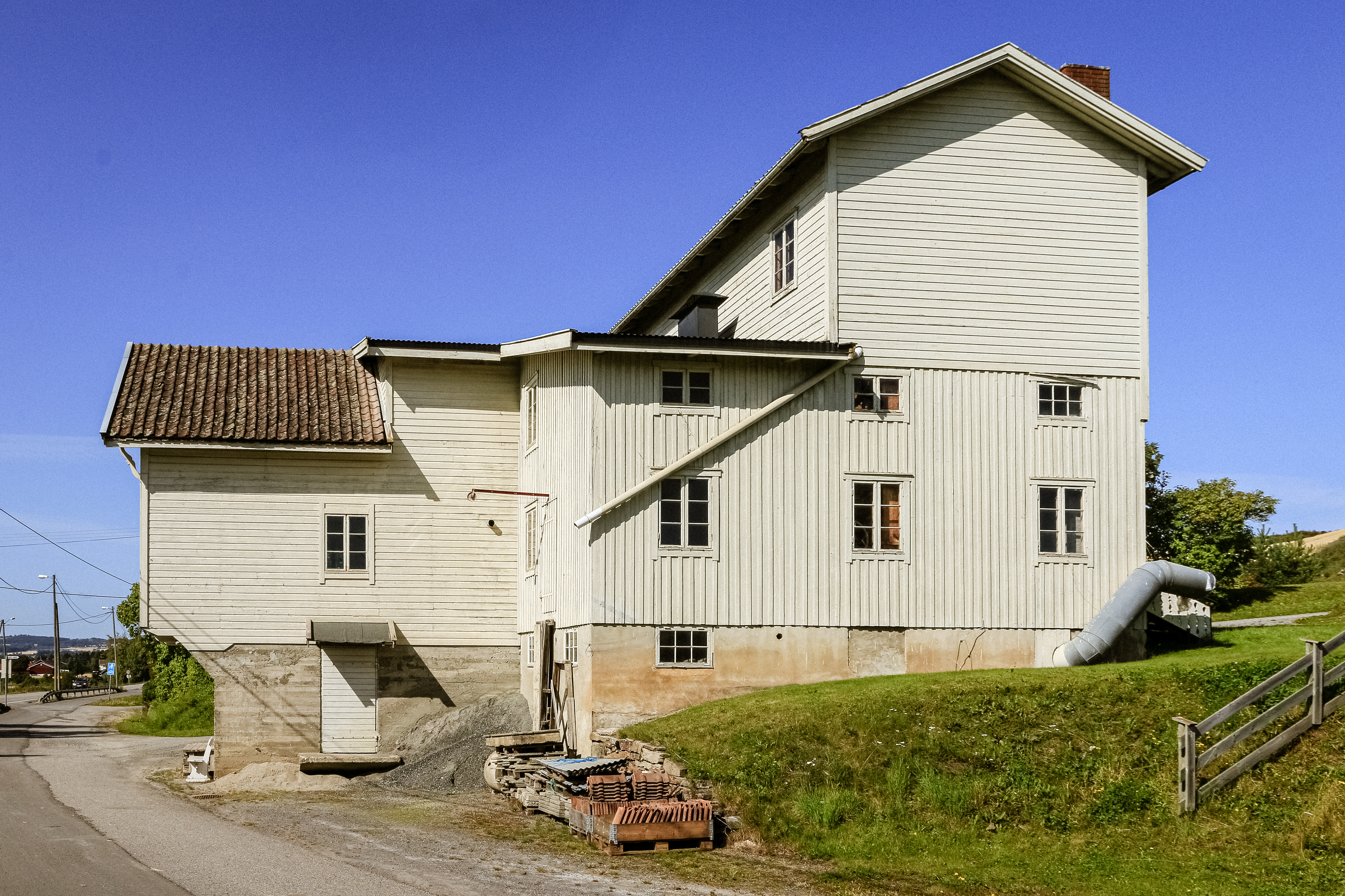 Bilitt Mølle, Mill by Skraia, Østre Toten, Norway